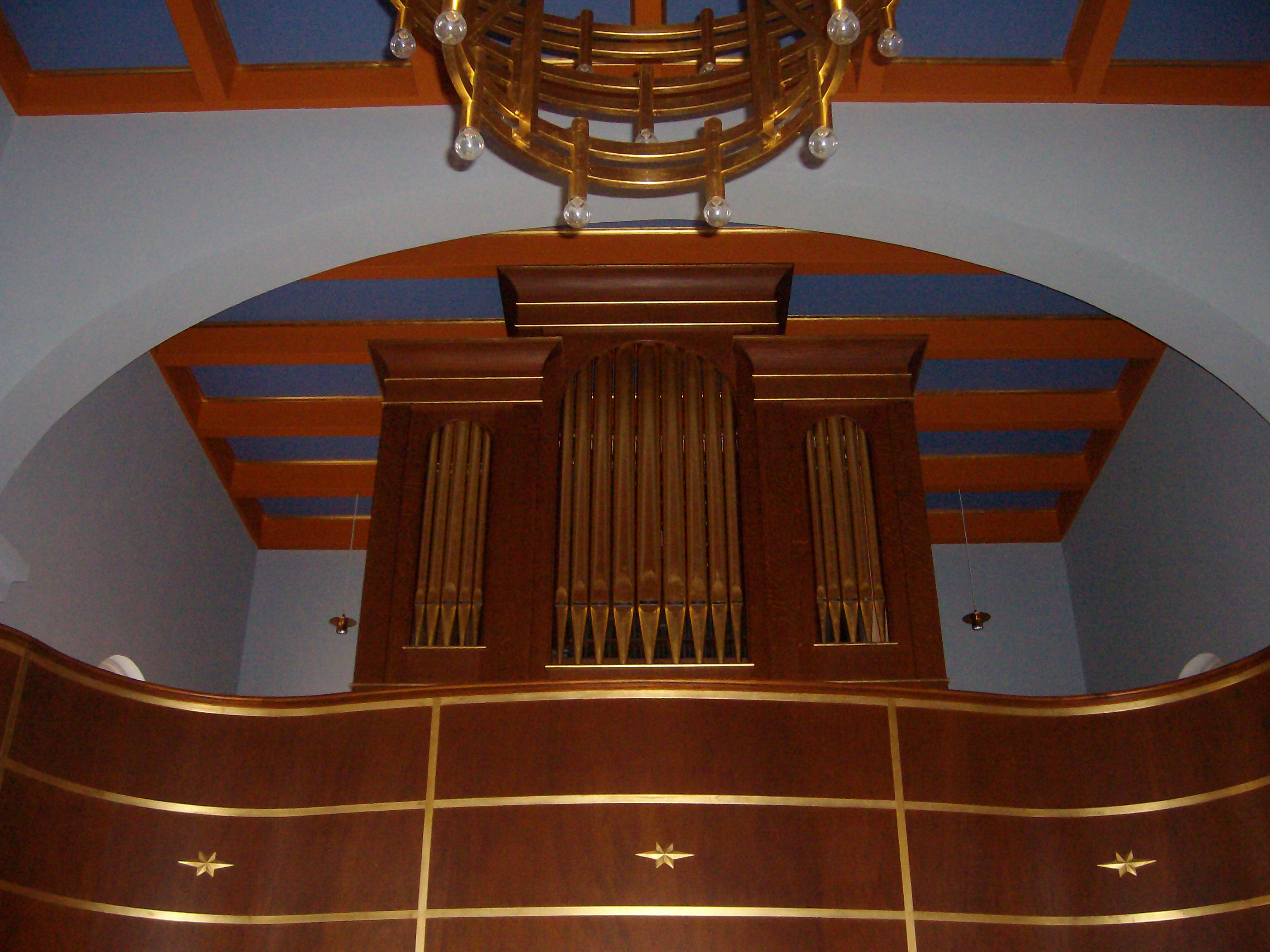 Orgel Jemgum